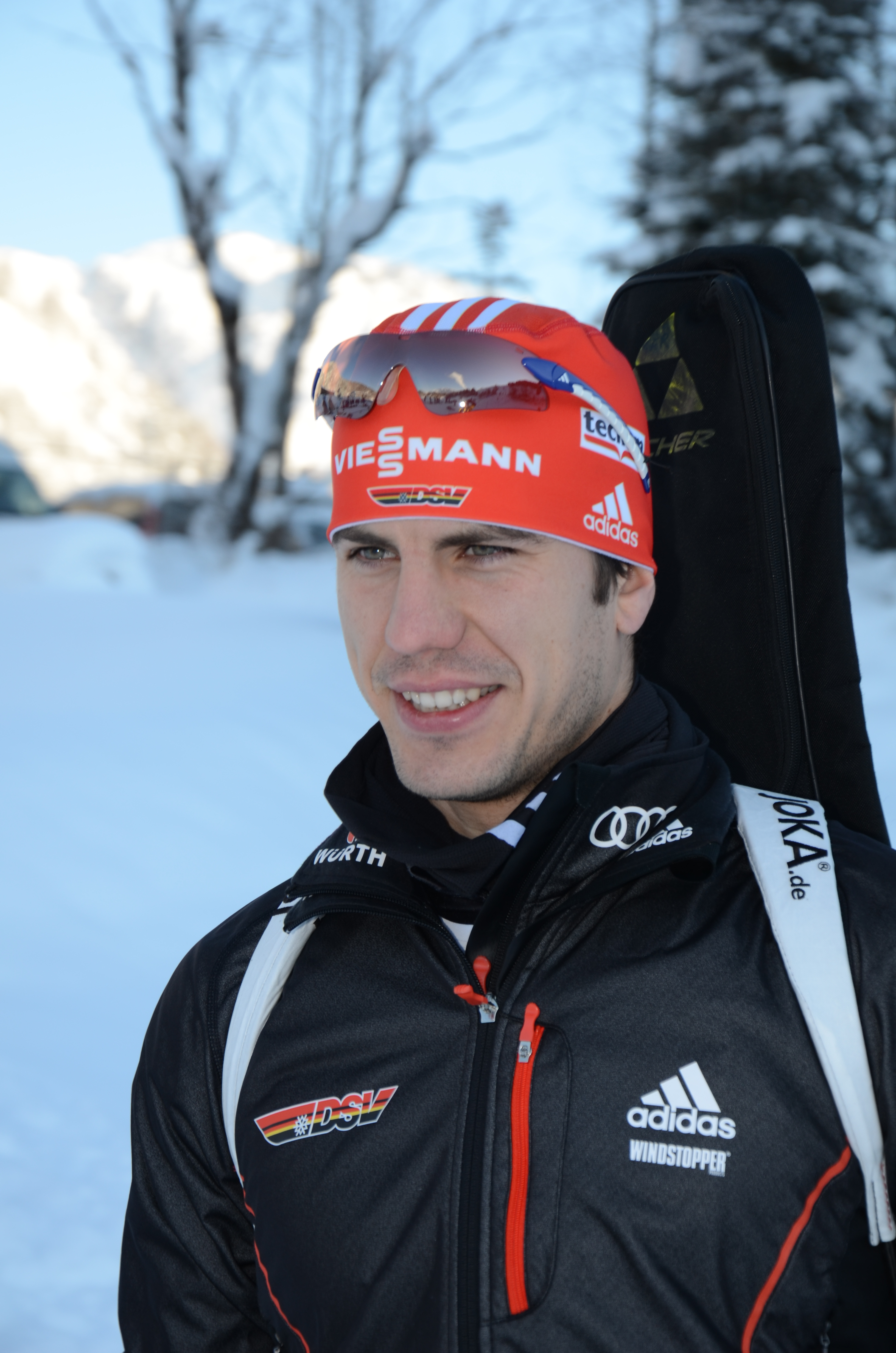 Arnd Peiffer beim Biathlon-Weltcup 2012 in Hochfilzen